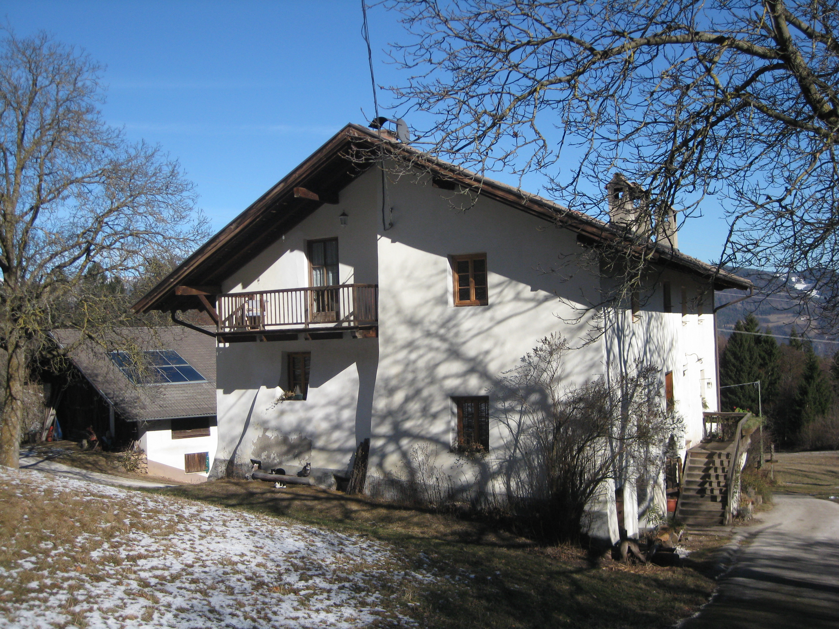 Mair (Moarhof) in Gaid, Eppan, Südtirol